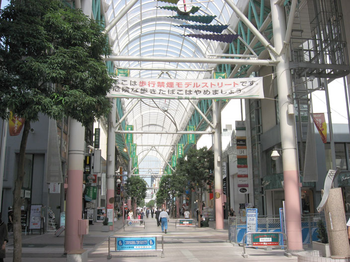 仙台市青葉区一番町 ぶらんどーむ一番町